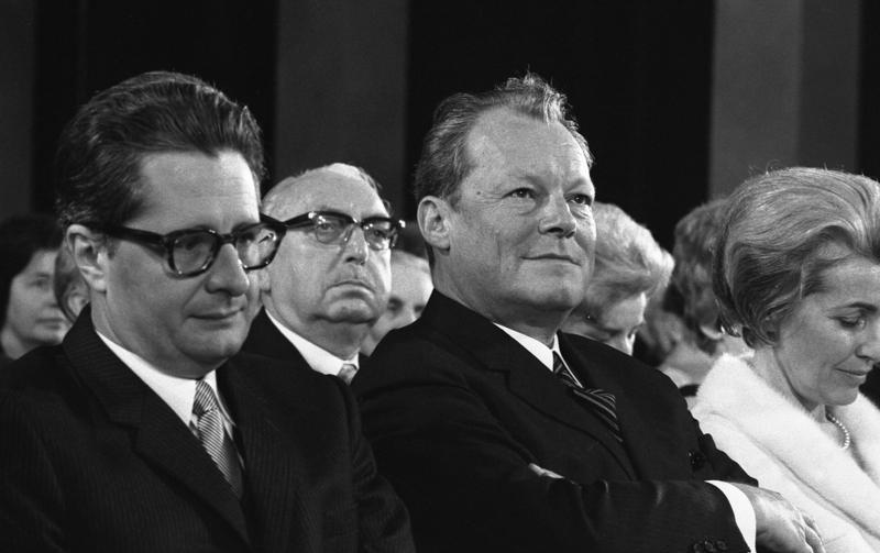 Verleihung des Theodor-Heuss-Preises an Oberstaatsanwältin Barbara Just-Dahlmann und an die Lebenshilfe für geistig Behinderte e.V. Bürgeraktion zum Schutze der Demokratie e.V. München